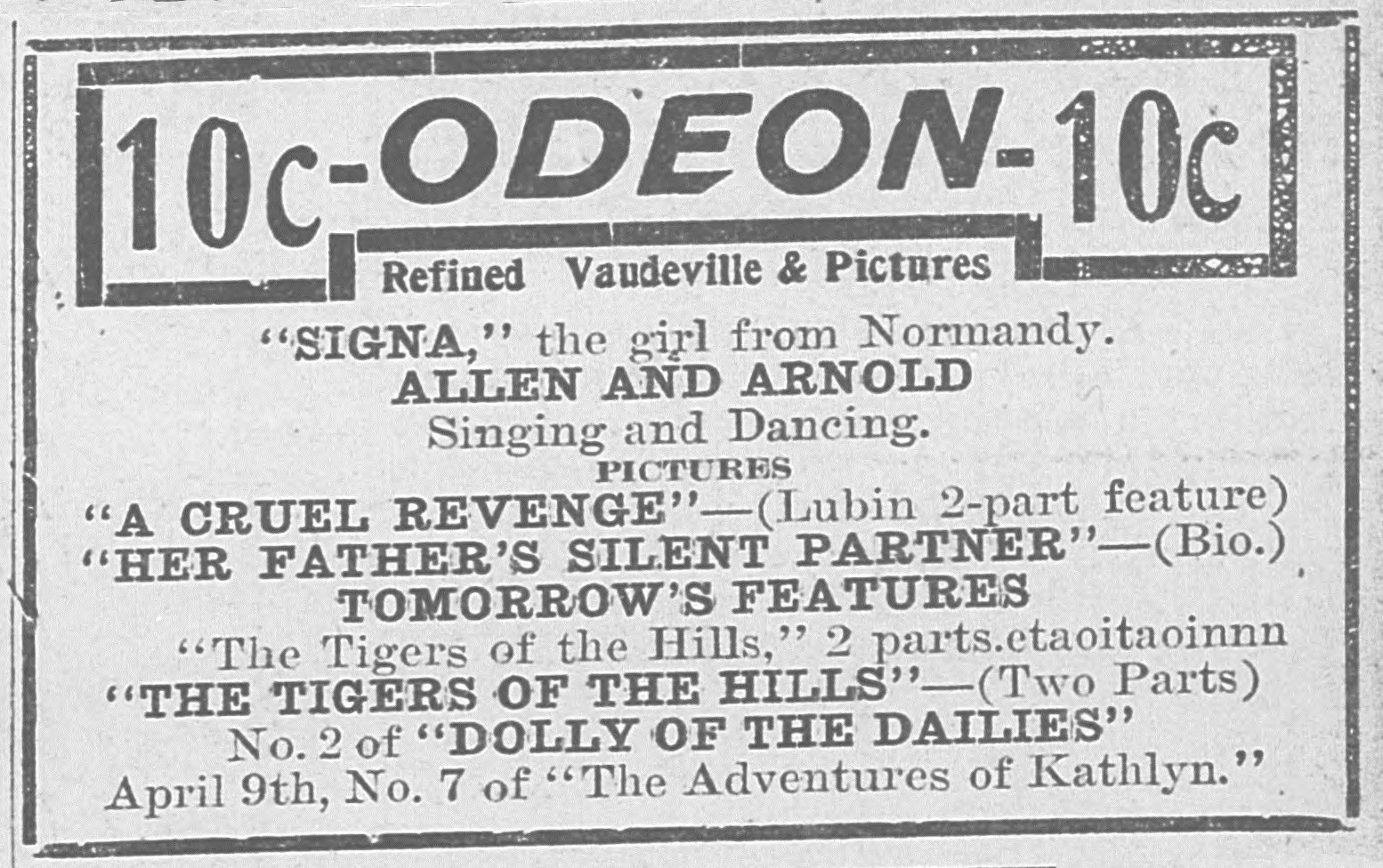 Her Father's Silent Partner advertisement